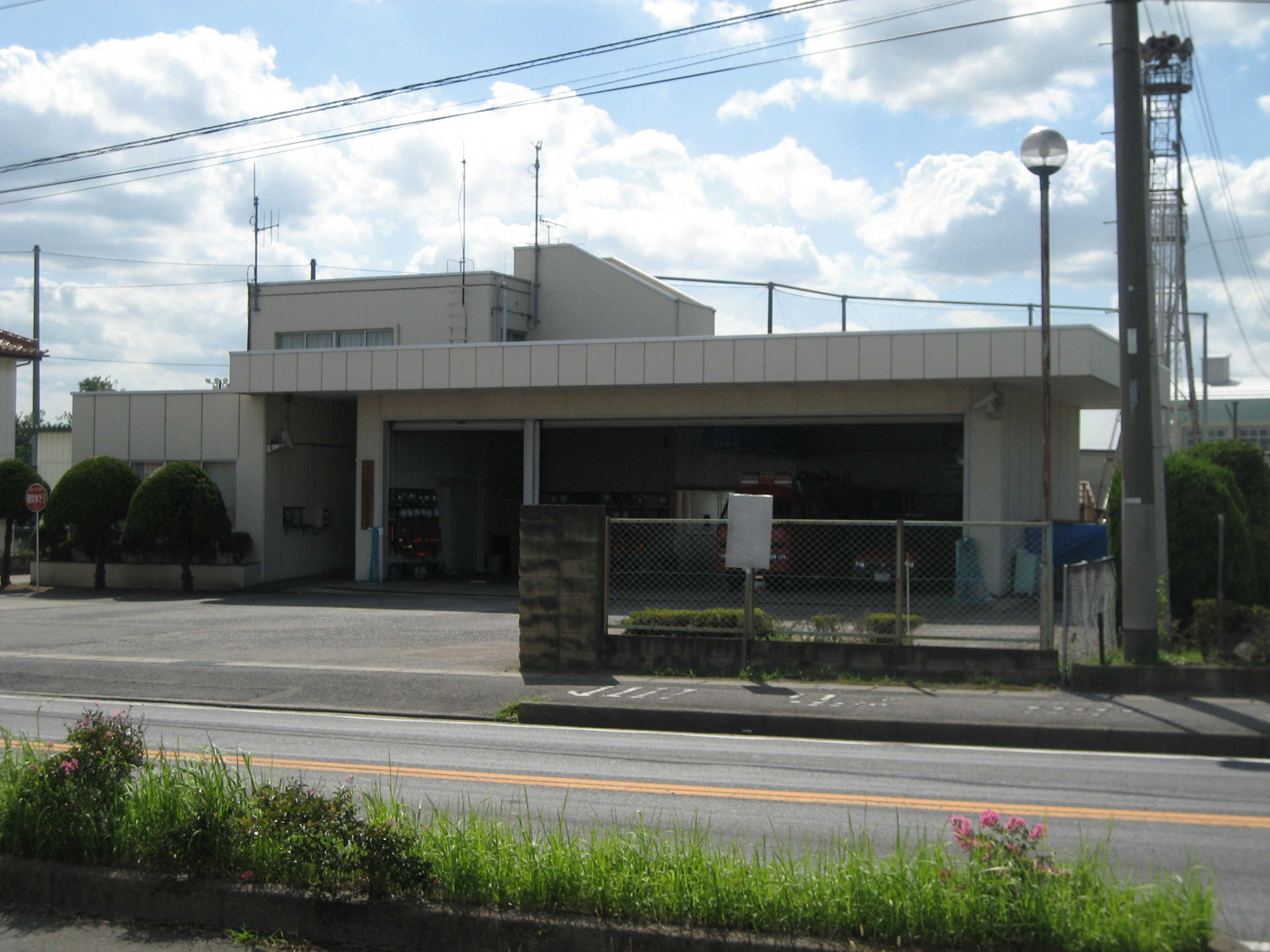 栃木地区広域行政事務組合消防本部藤岡分署正面